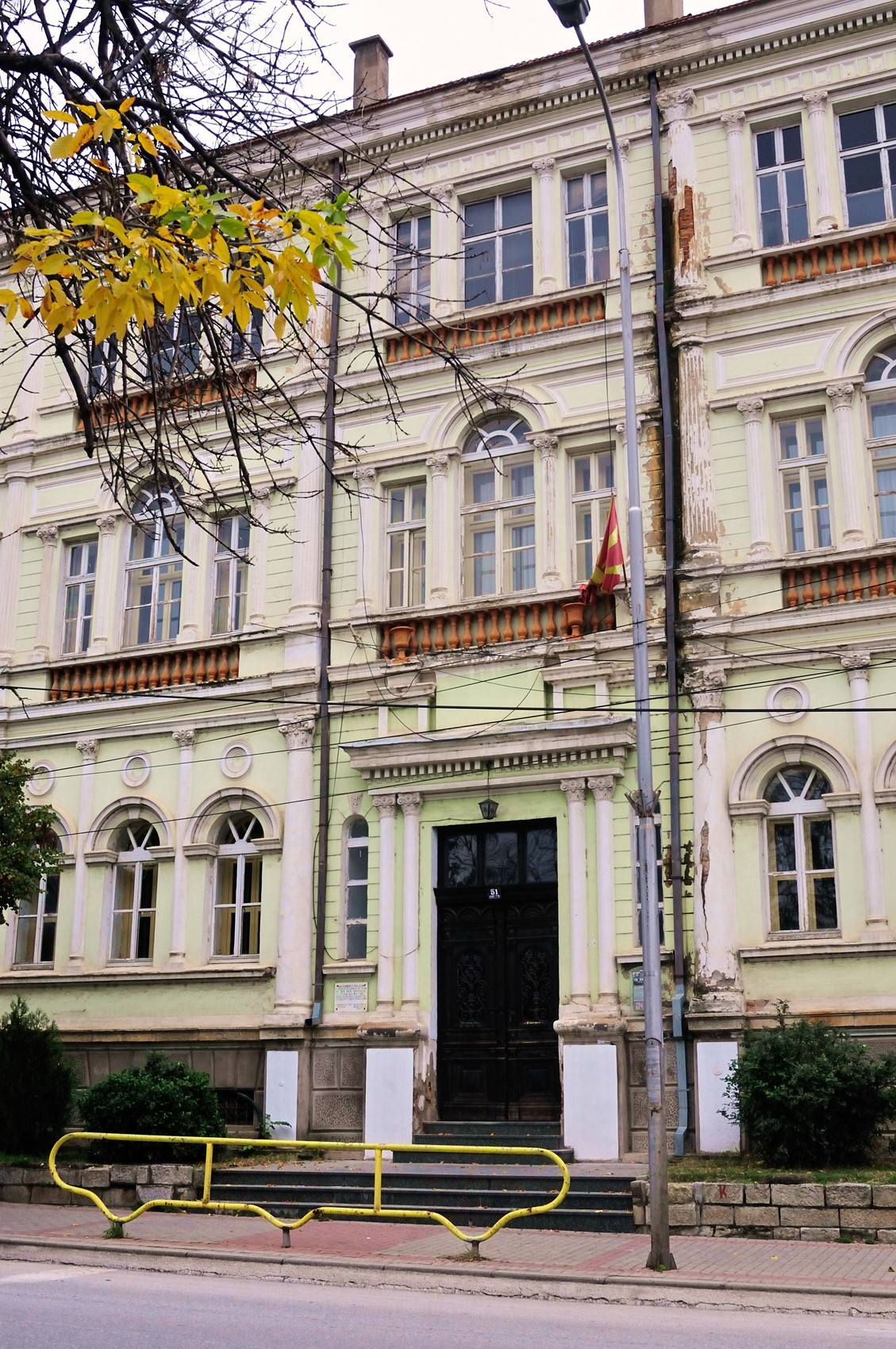 Gimnazija Josip Broz Tito Bitola